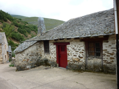 Pincón típico de Pobladura de la Sierra (León)